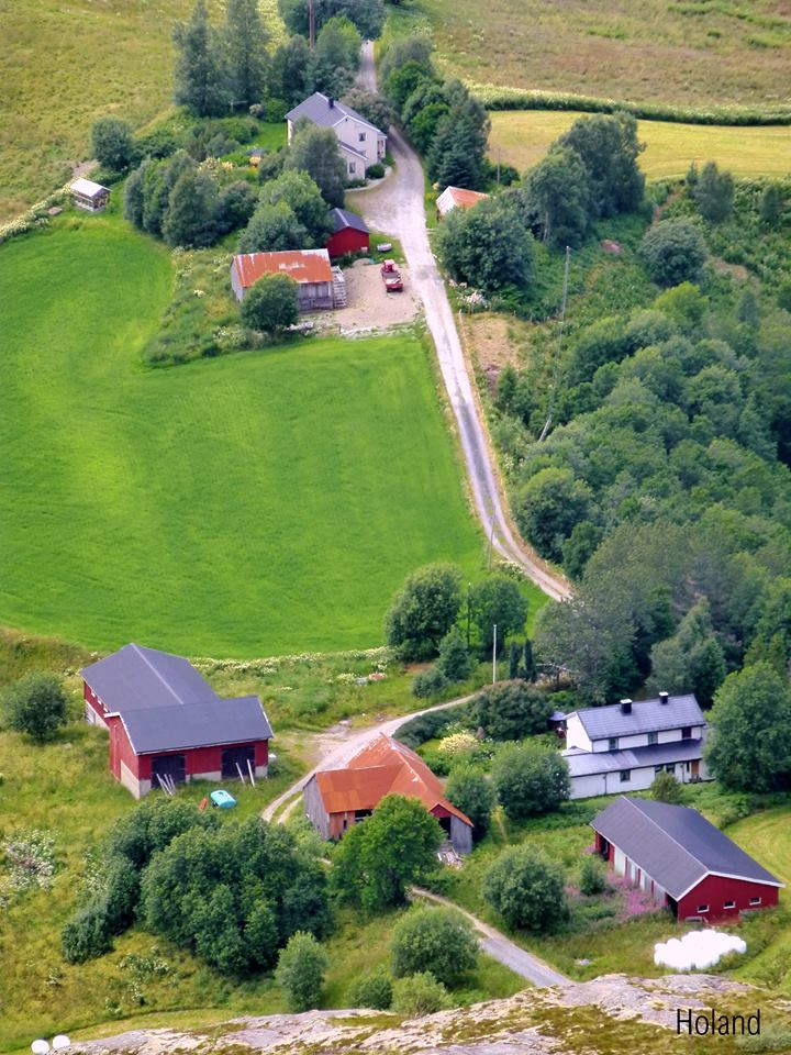 Holand sommer.